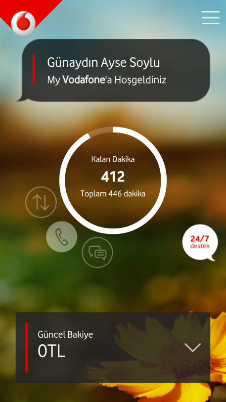 My Vodafone ekran görüntüsü